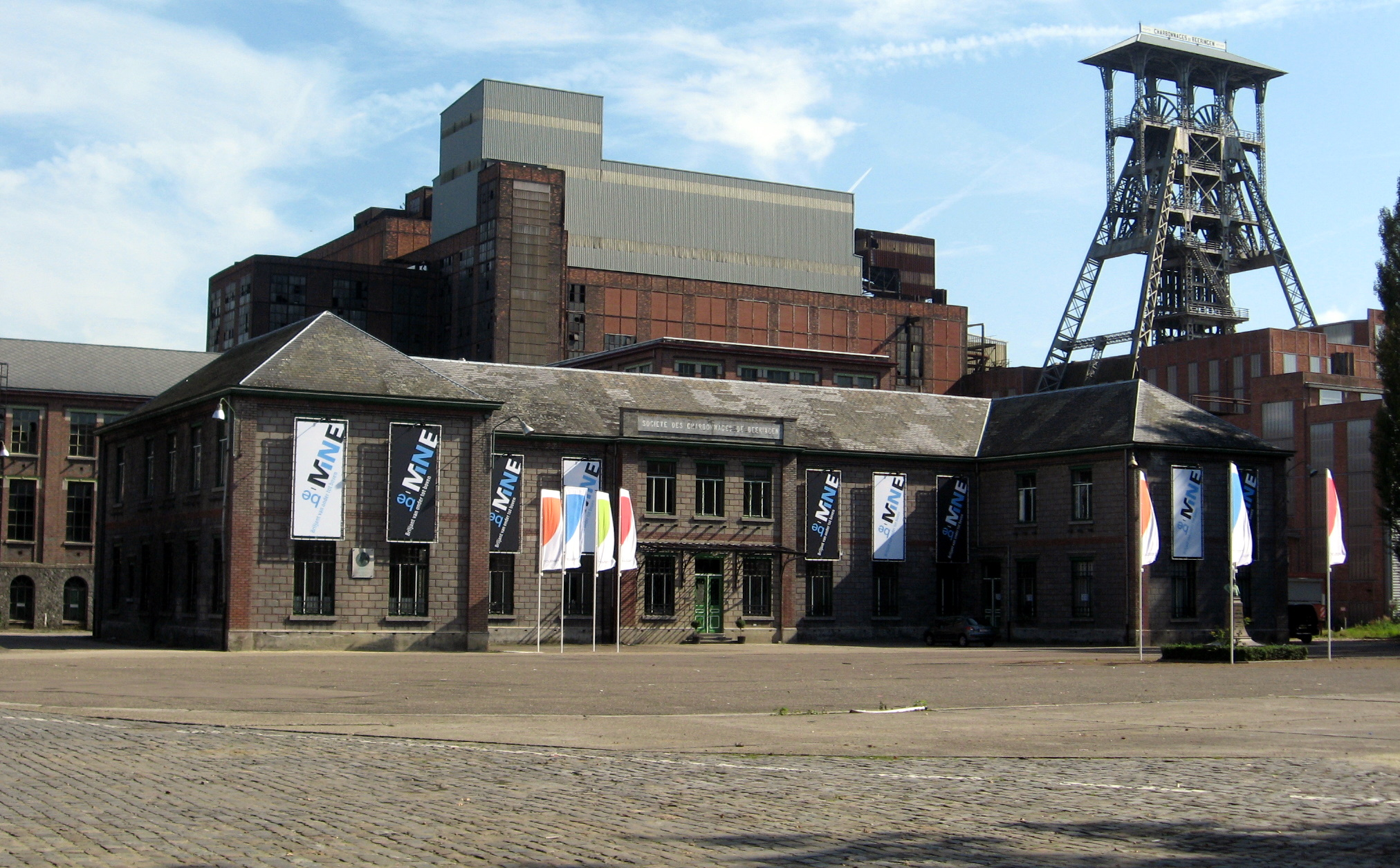 Centrale burelen met op de achtergrond de kolenwasserij en -zeverij van de Steenkoolmijn Beringen in Koersel